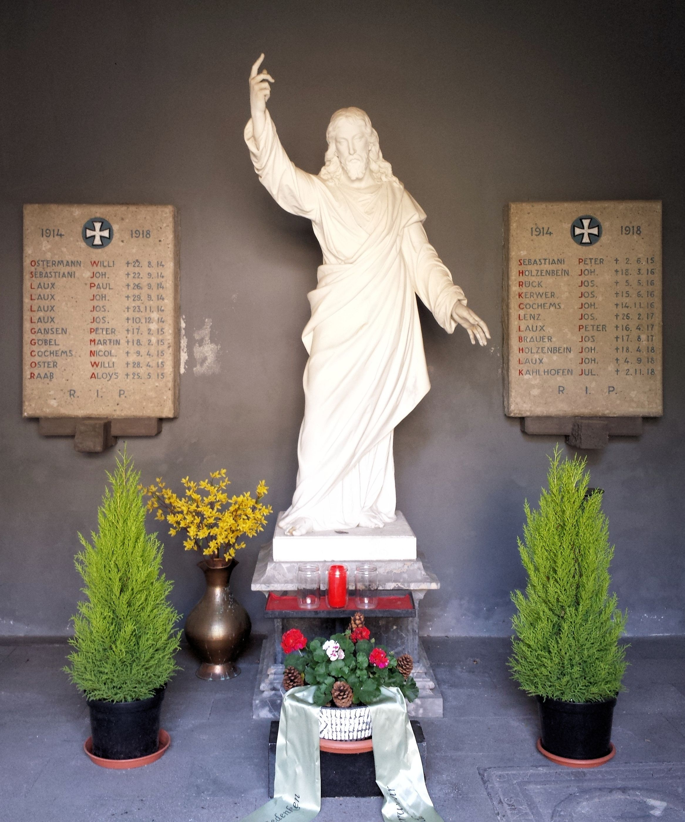 Christusfigur